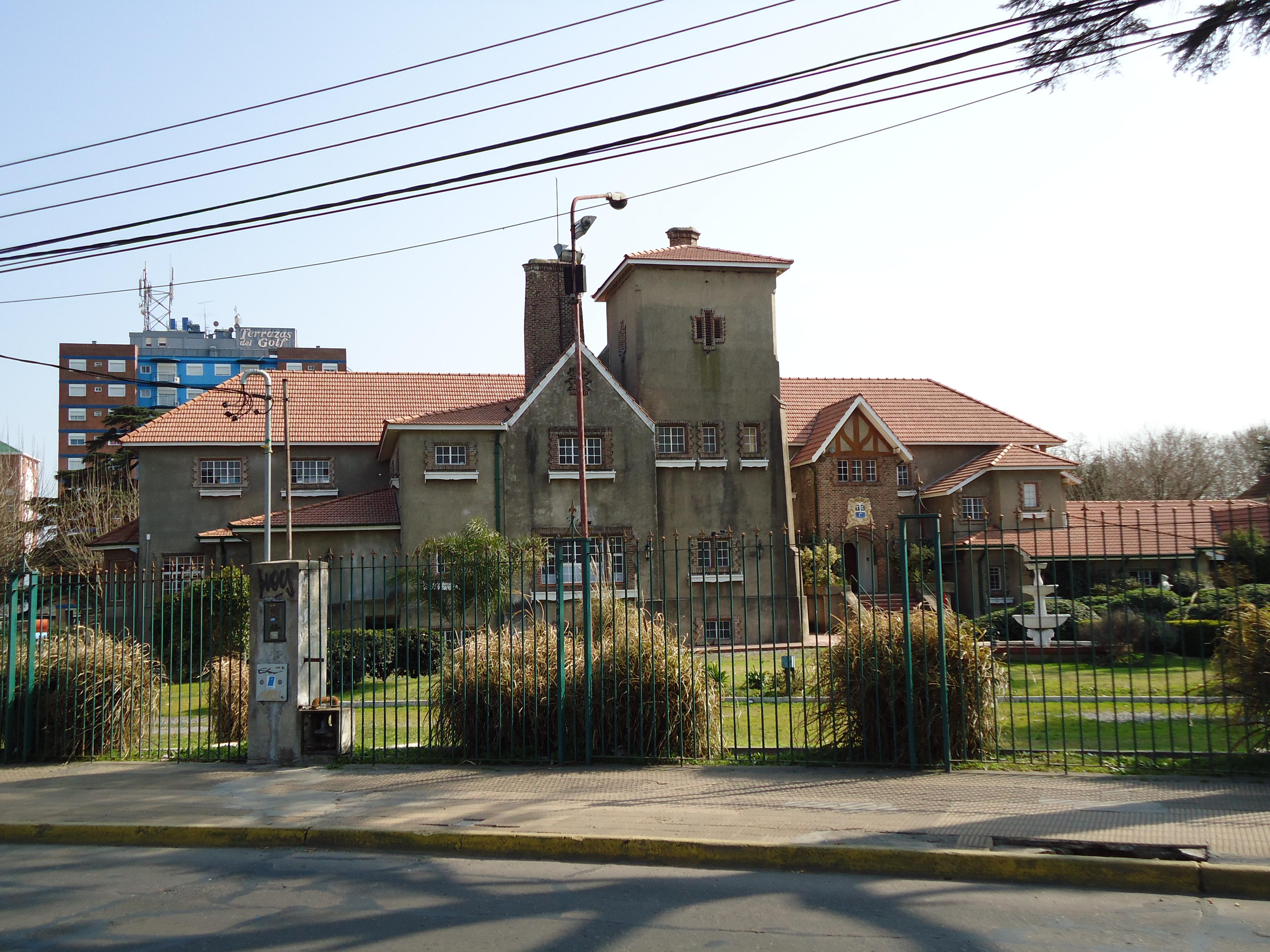 antiguo Club House del Ituzaingó Golf Club, Merlo, Argentina. Contrucción Estilo Tudor del año 1919.